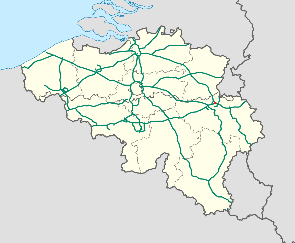 Knooppunt Vottem